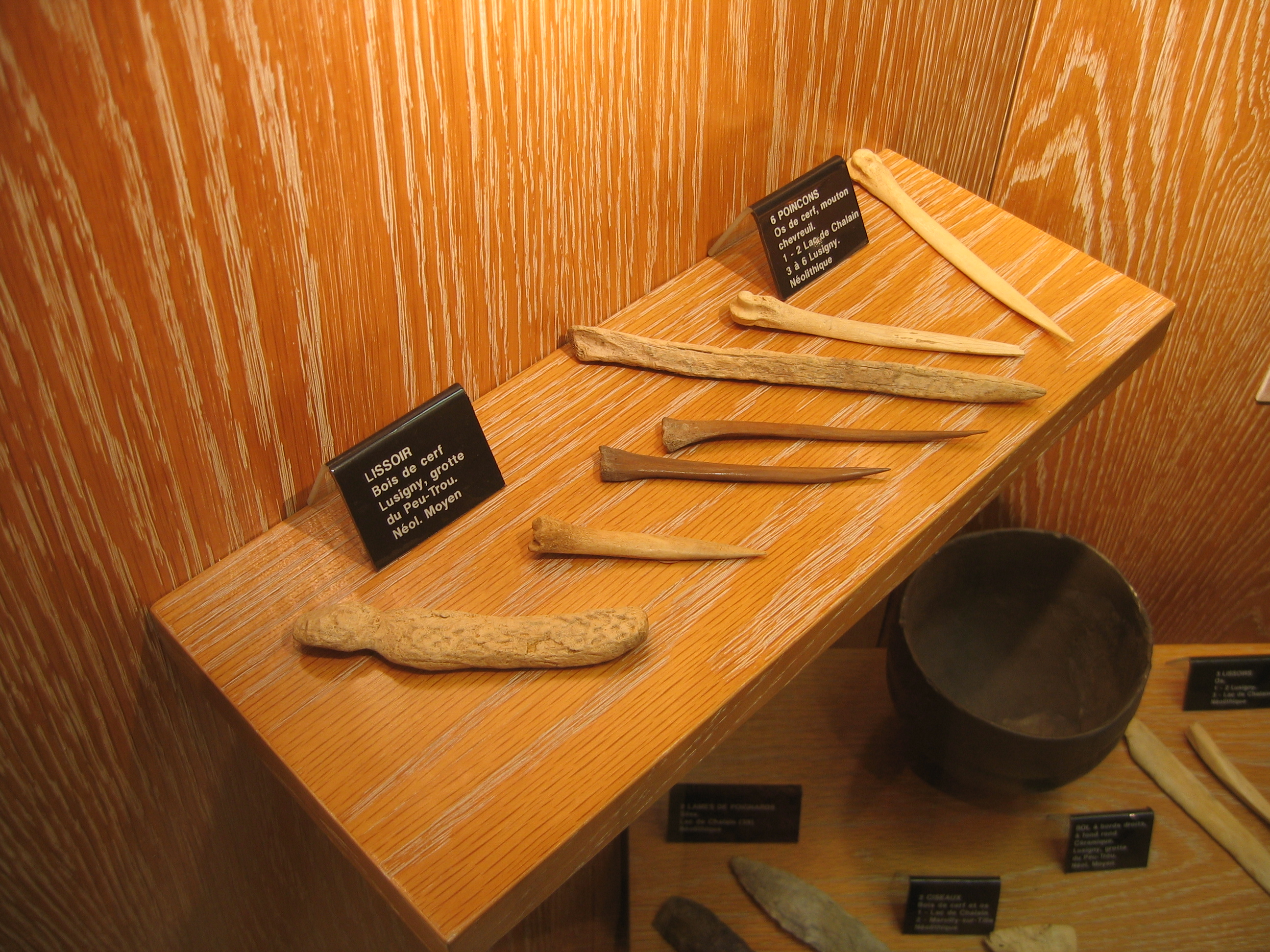 Lissoirs poinçons musée archéologique Dijon France